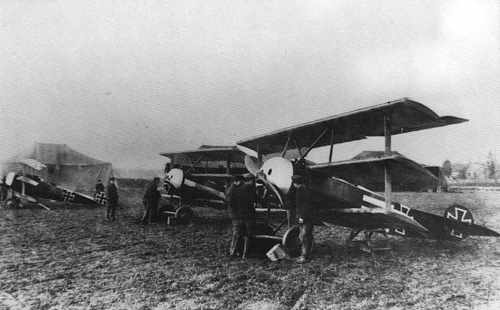 Jasta 12 flightline